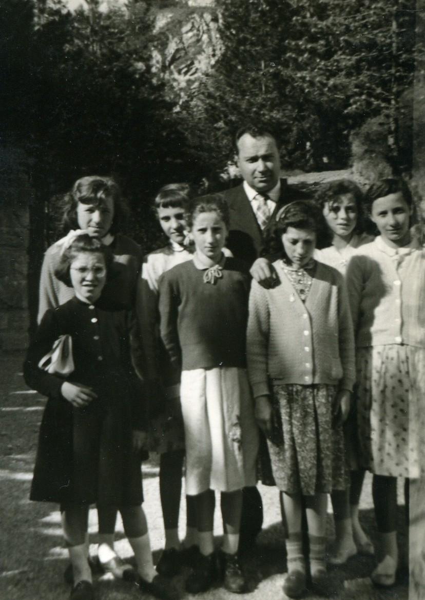 Il maestro Vito Zeni di Magasa con la scolaresca in Val di Ledro (circa 1960)